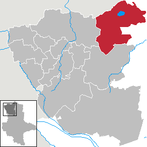 Lage von Arendsee im Altmarkkreis Salzwedel